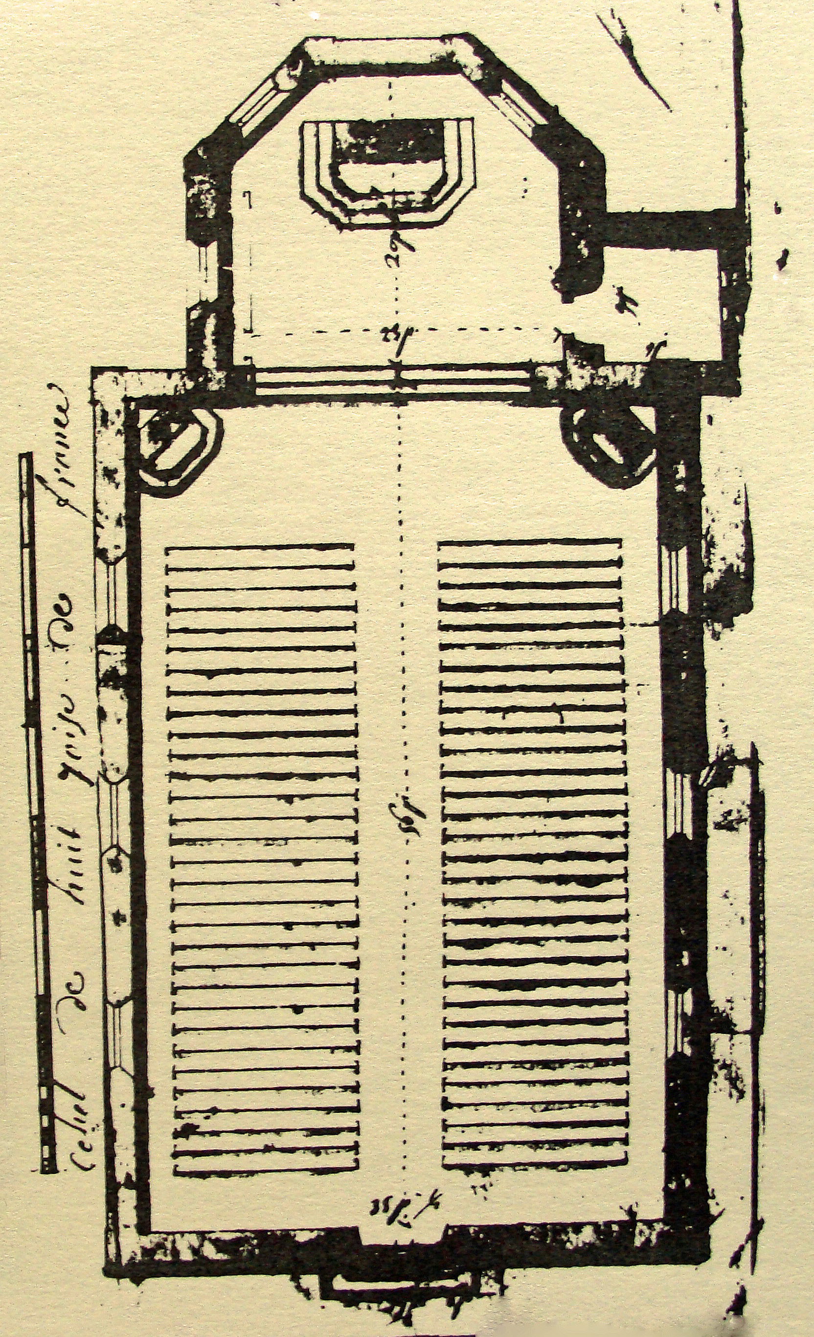 église de L'Hôpital, plan de 1752 (intérieur)